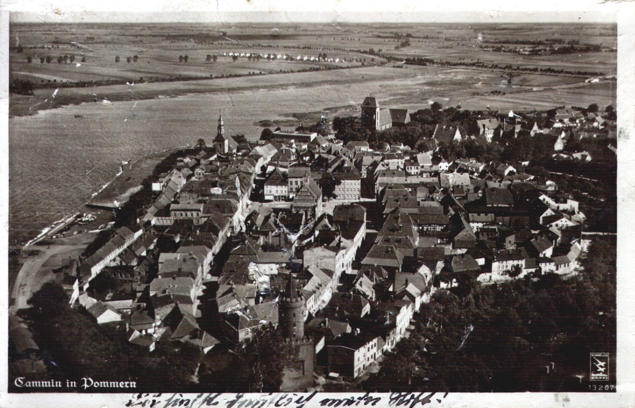 Kamień Pomorski w roku 1941.